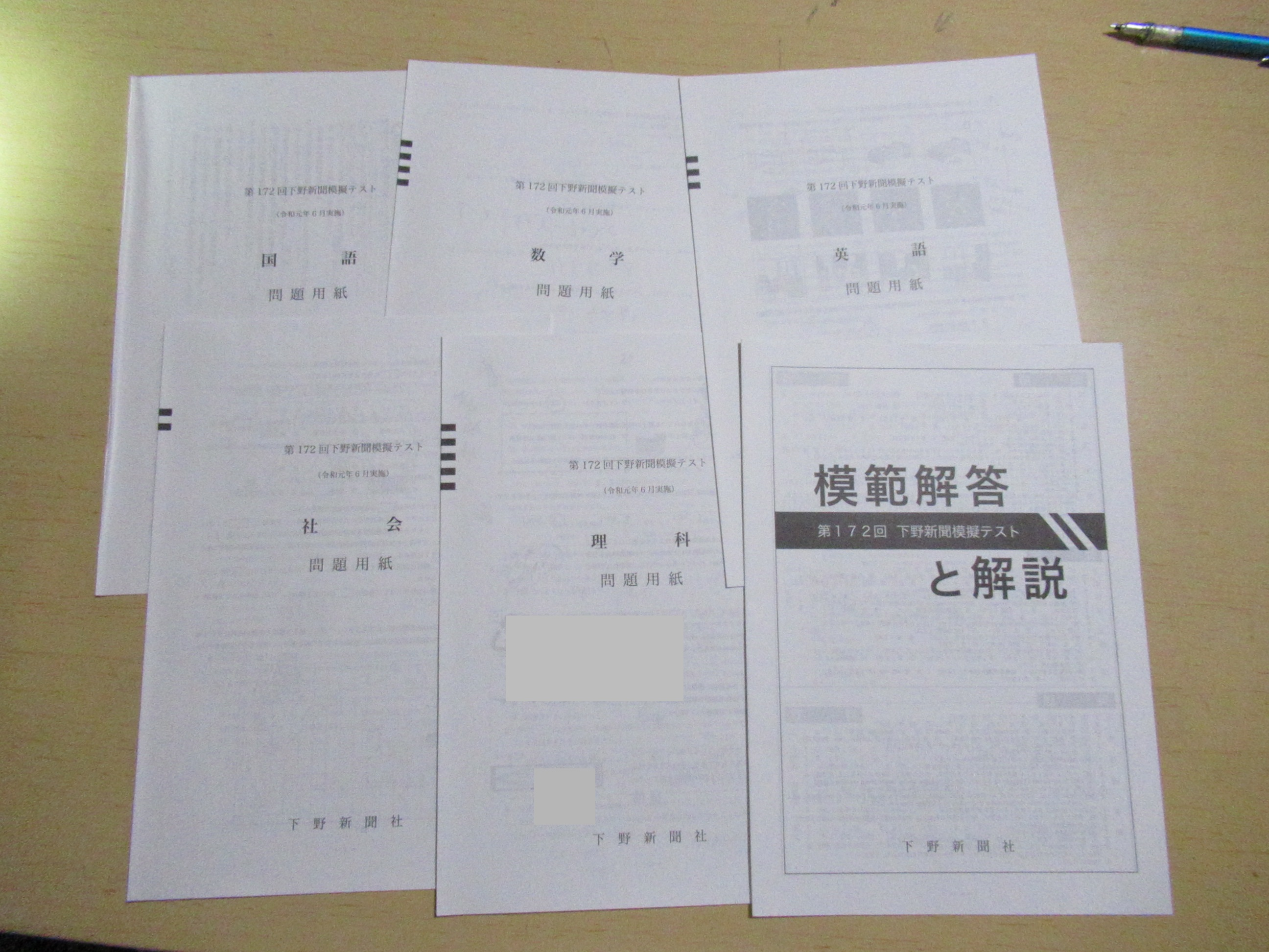 第172回(2019.06実施)下野新聞模擬テストの実際の問題用紙の表紙画像です。